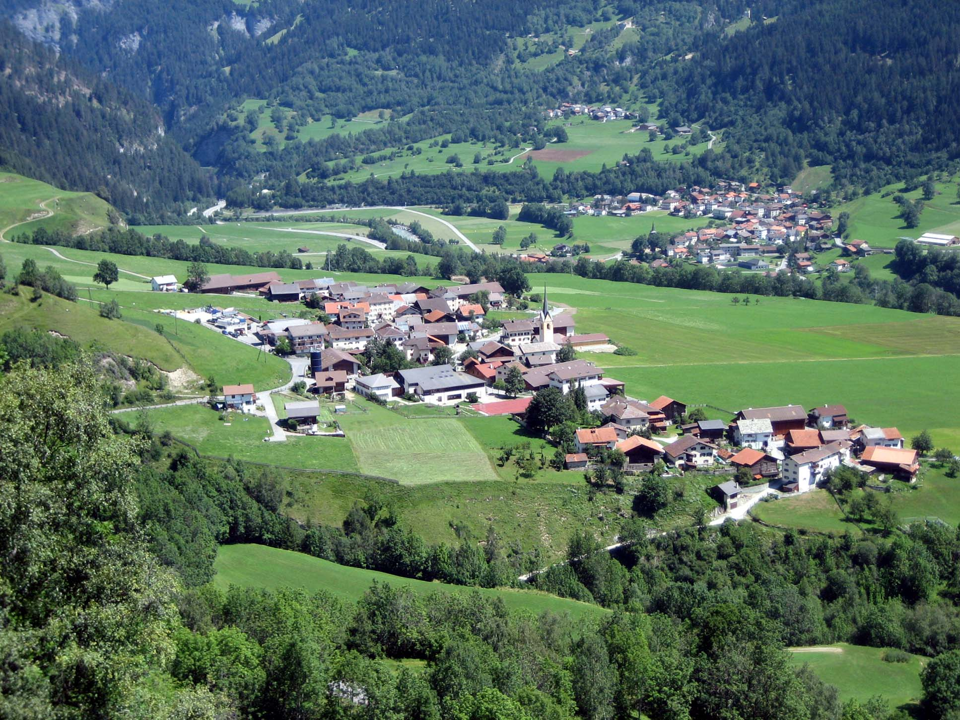 Donat